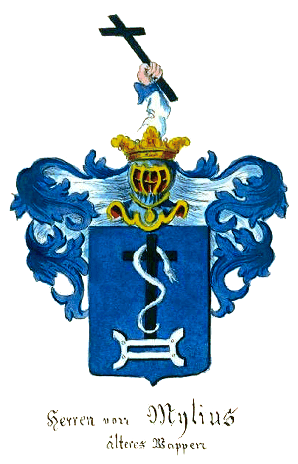 Wappen derer von Mylius